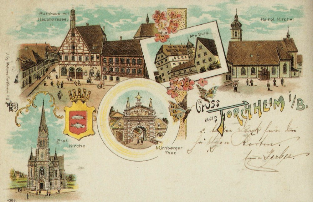 Forchheim